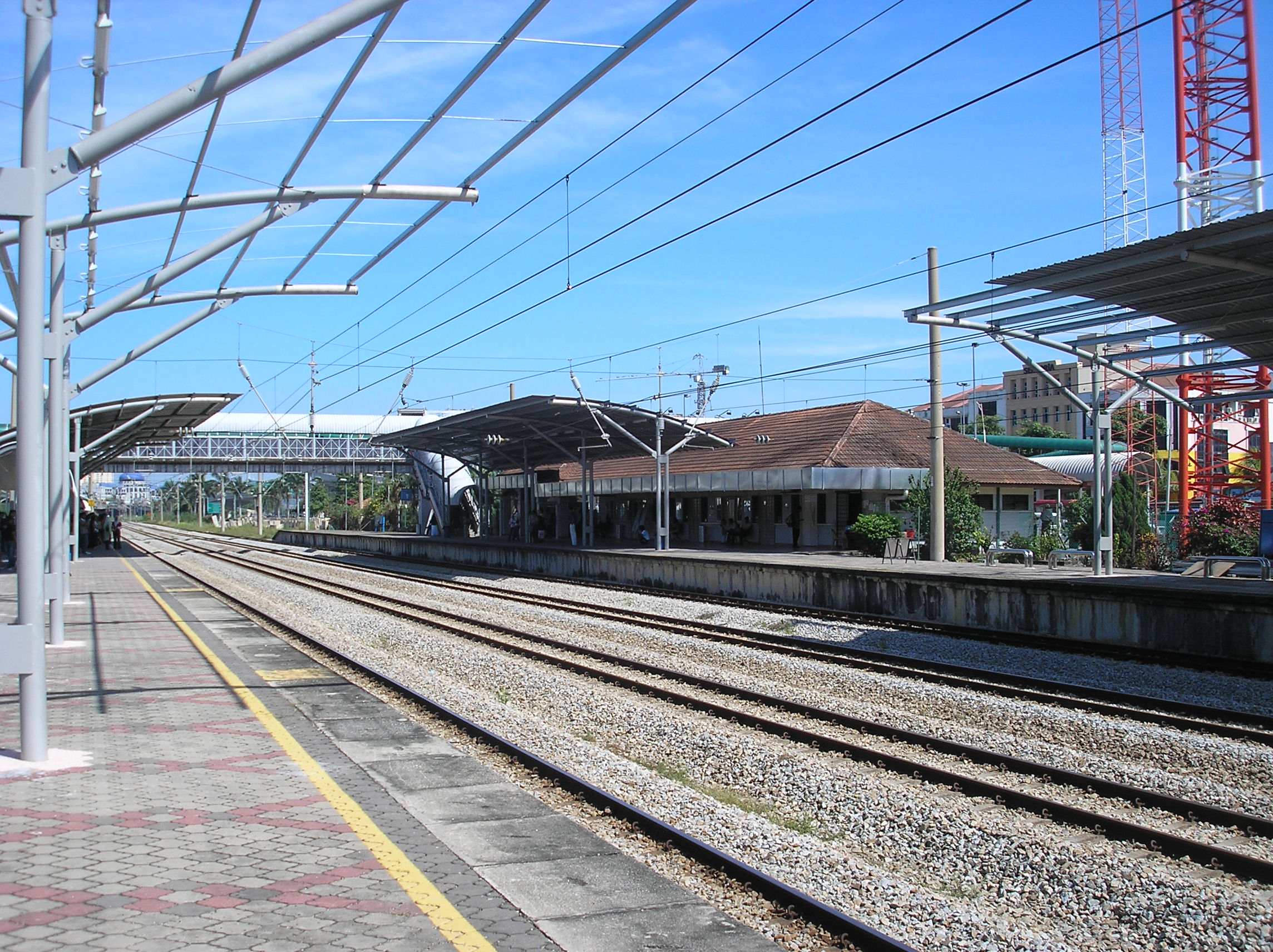 The Serdang Komuter station (Rawang-Seremban) Serdang, Selangor, Malaysia.